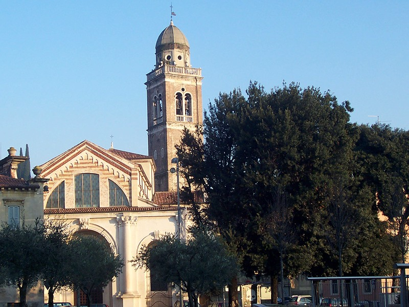 Verona - Chiesa di S. Maria in Organo